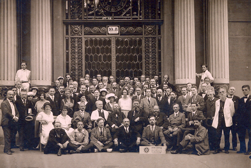 1. Ido-Weltkongress, Wien 1921. Gruppenfoto der Teilnehmer